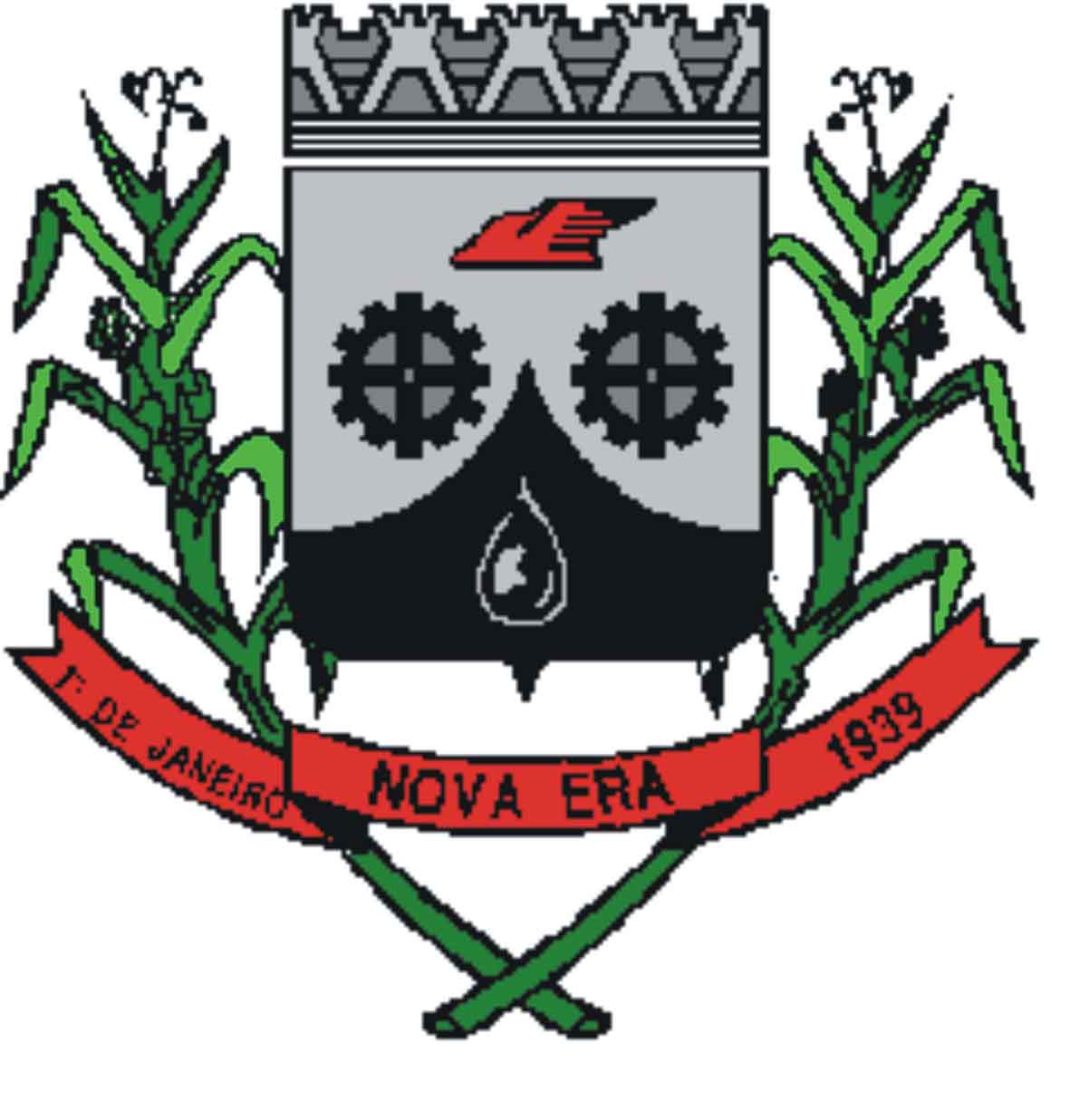 Brasão do município de Nova Era, MG, Brasil.